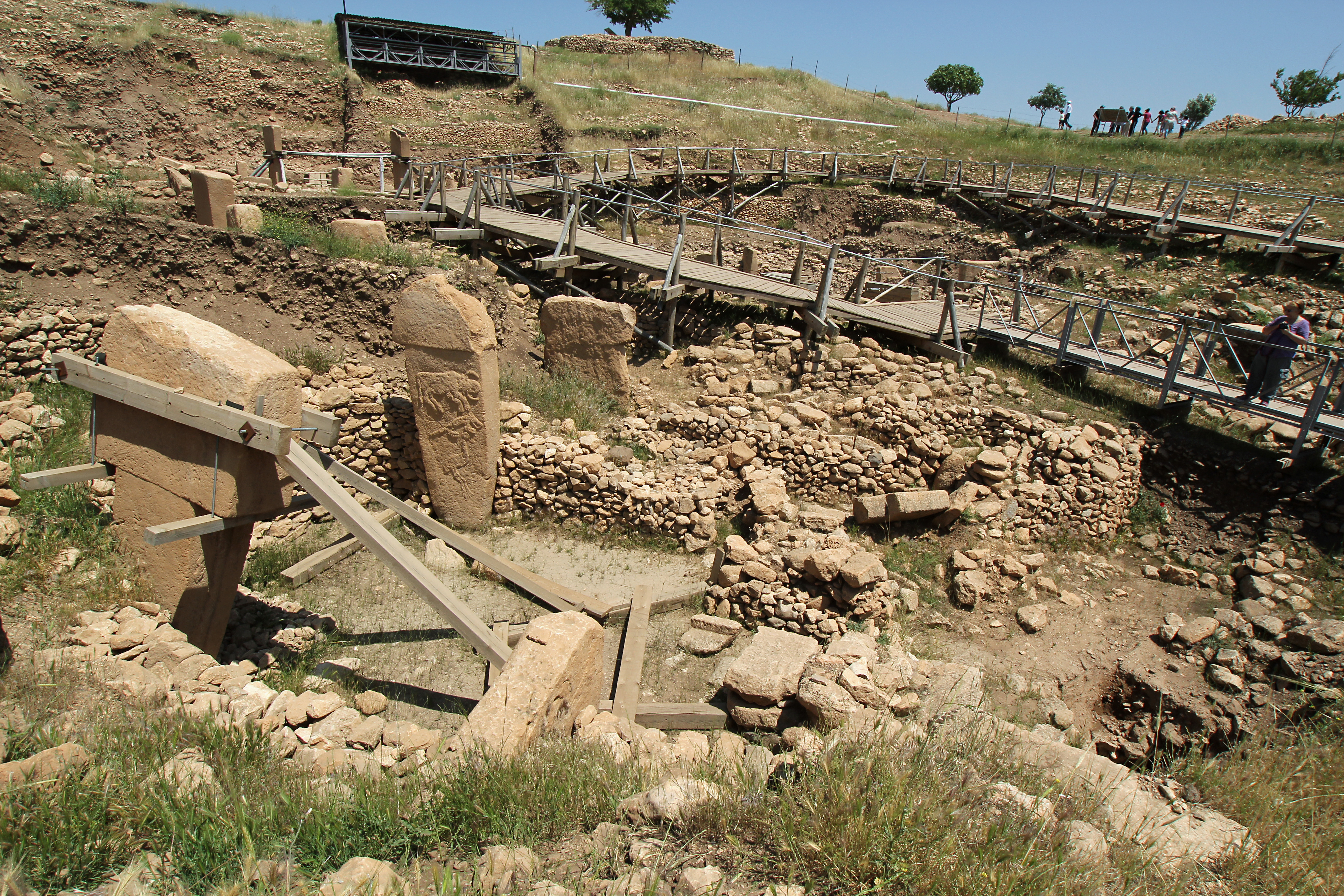 Göbekli Tepe, Siedlungshügel bei Şanlıurfa, Südosttürkei, Anlage A